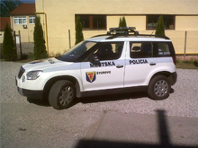 Mestská polícia Štúrovo